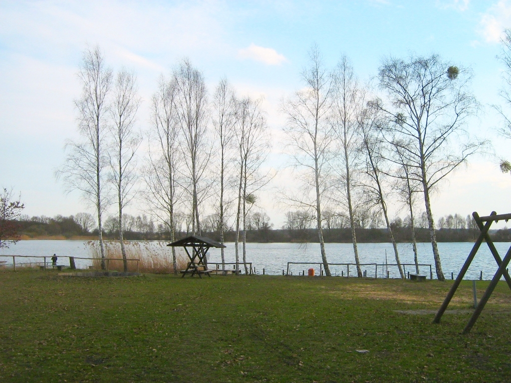 Der Löcknitzer See bei der kleinen Stadt Löcknitz im Landkreis Vorpommern-Greifswald (Pommern).